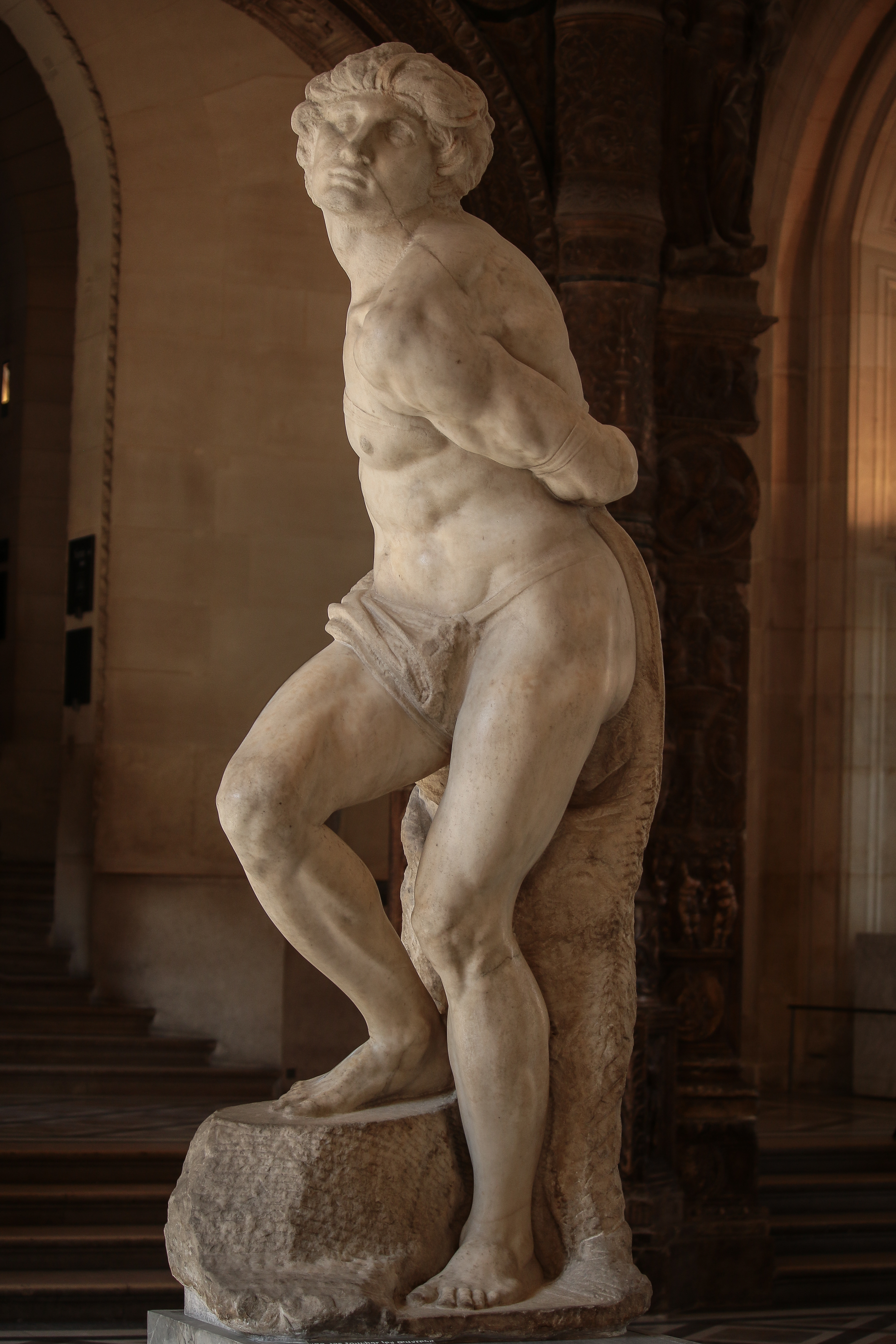 Michelangelo: Rebellischer Sklave (auch: Heroischer Sklave / Gefangener, gefesselter Sklave) für das Grab Julius II., ca. 1513-15, Paris, Louvre